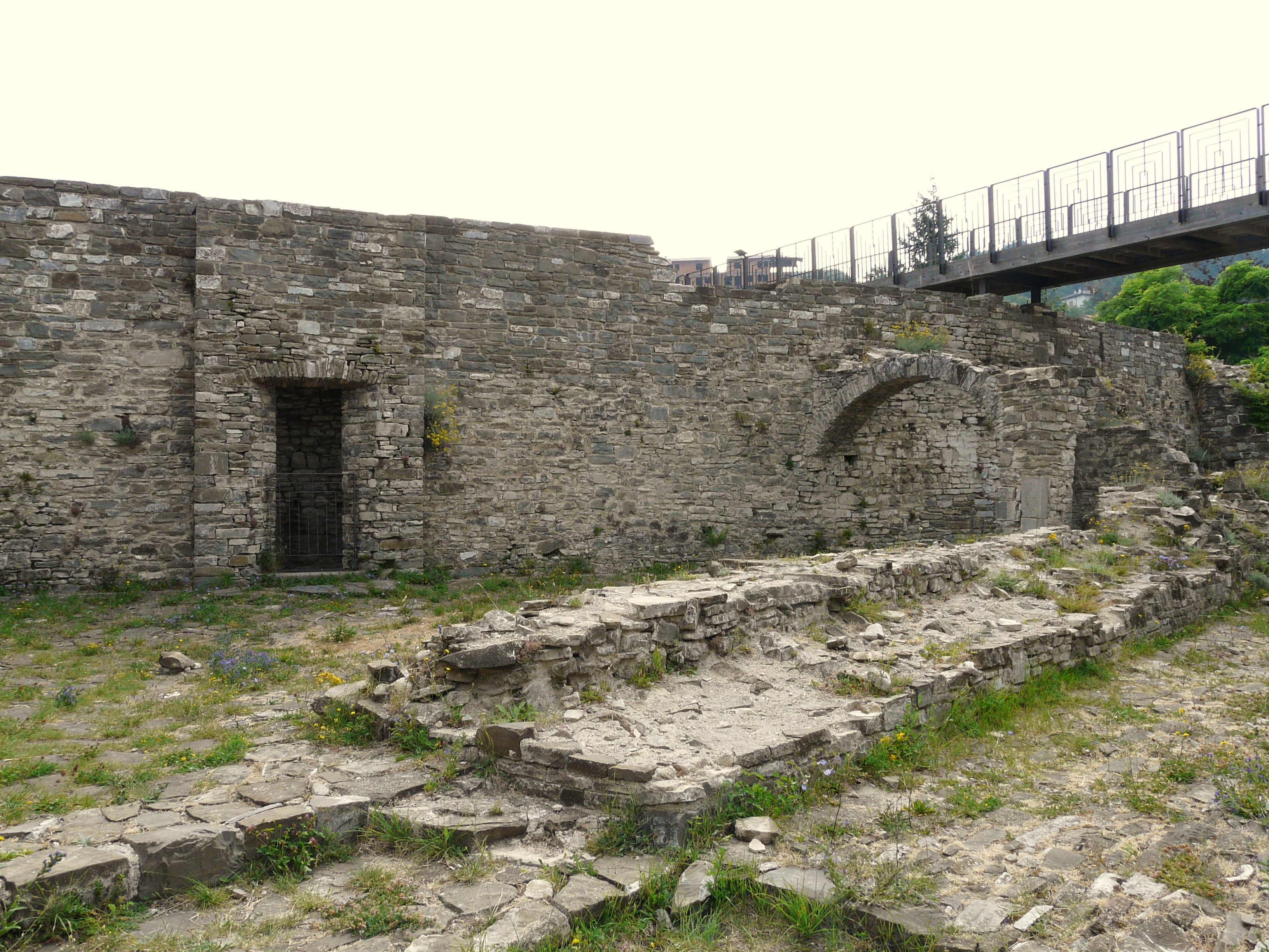 Ruderi del castello di Berceto, Emilia Romagna, Italia